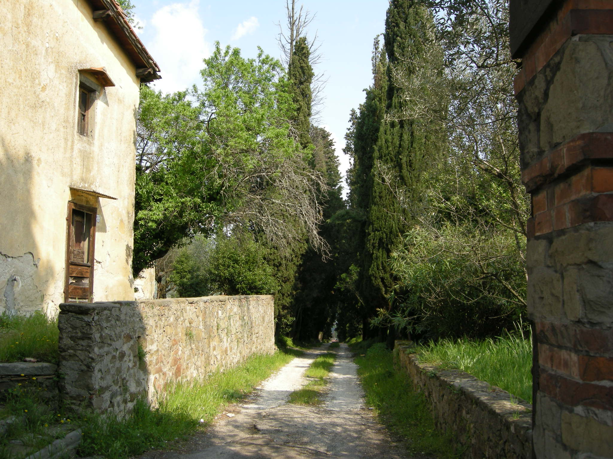 Villa fiorale